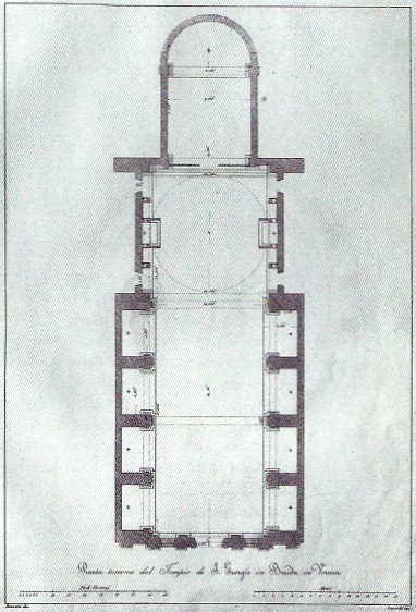 Pianta della chiesa di San Giorgio in Braida